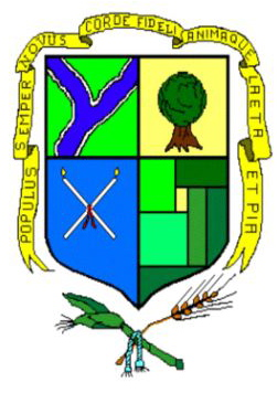 Escudo Oficial De Pueblo Nuevo Gto.